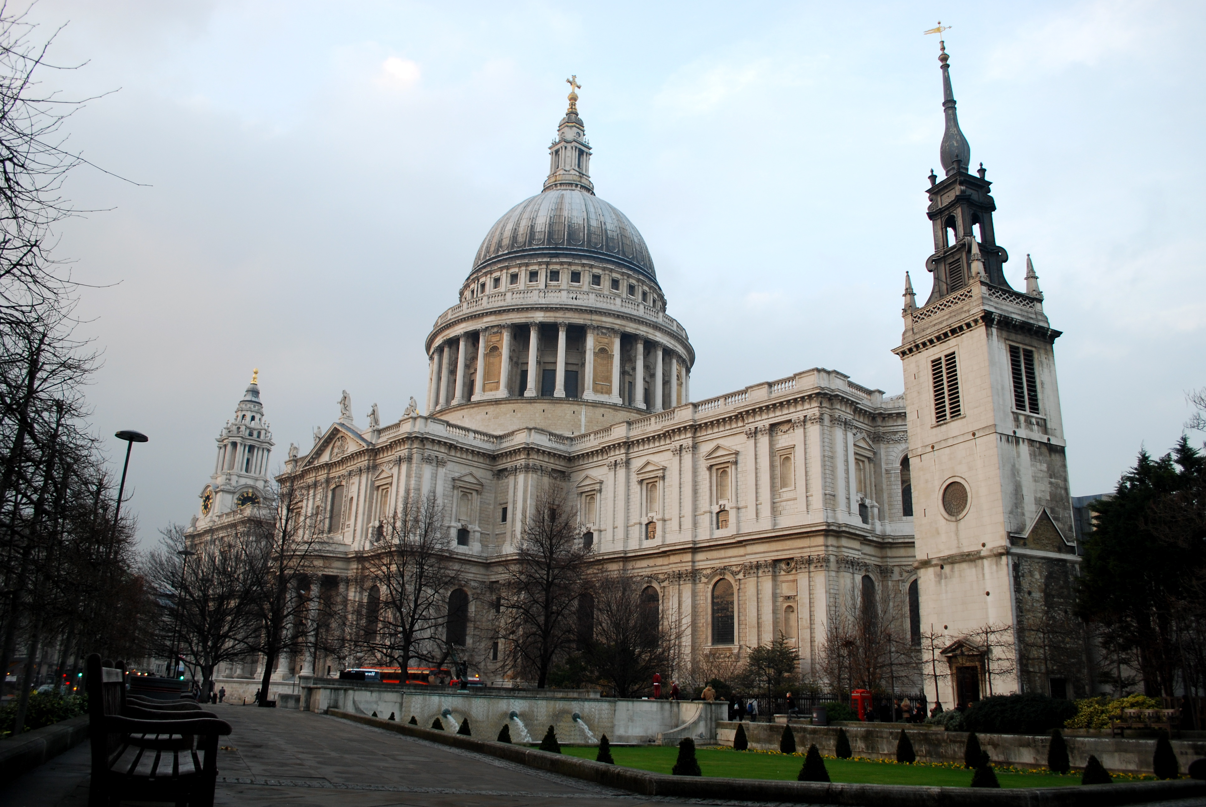 Catedral de San Pablo (Londres)